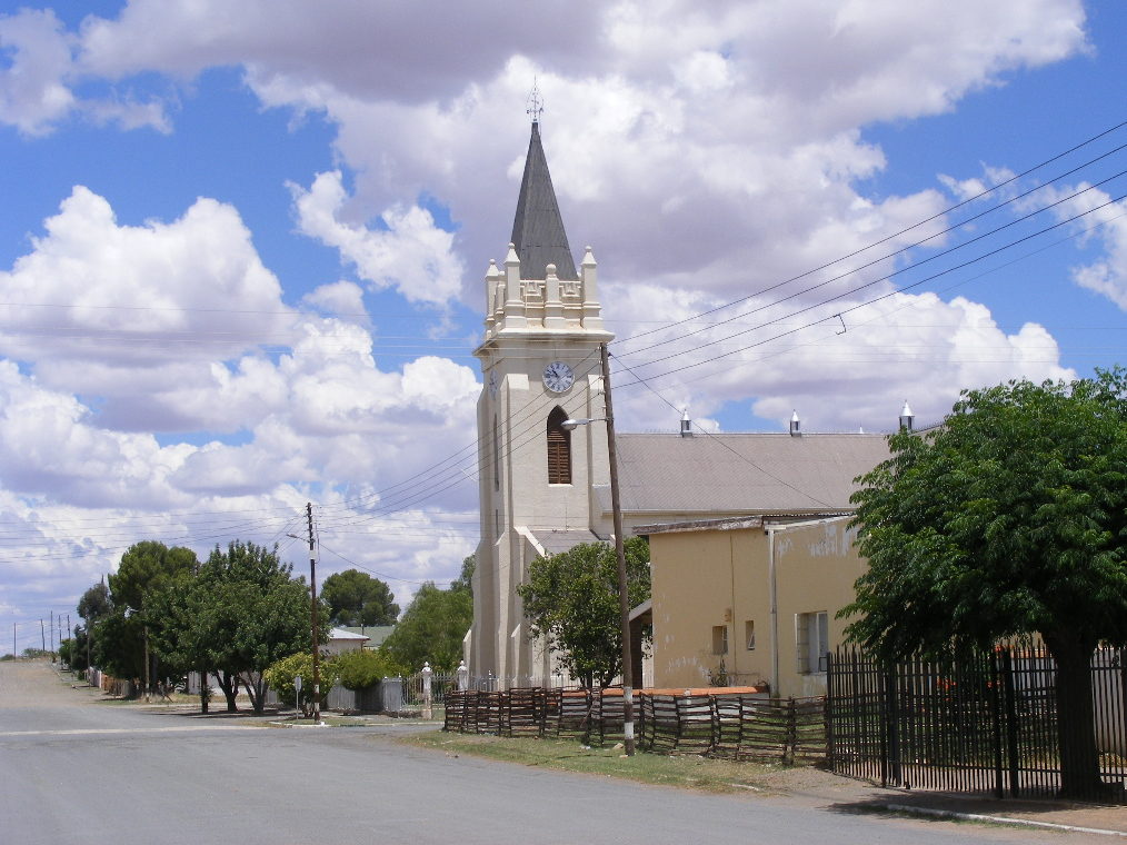 Niederdeutsch Reformierte Kirche Britstown/SA